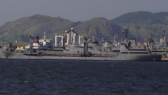 Navio Tanque Marajó da Marinha do Brasil